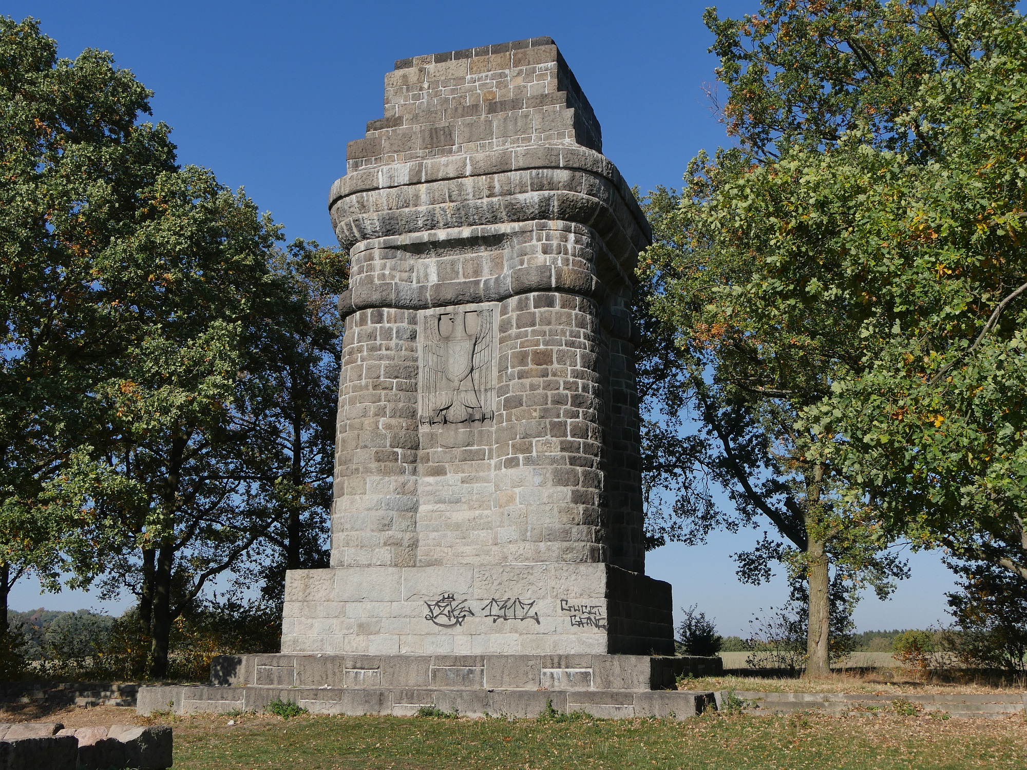 Bismarcksäule Friedrichsruh